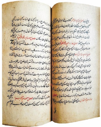 Məhəmməd bin Mənşur. Qiymətli daşlar haqqında (Cəvahirnamə)1